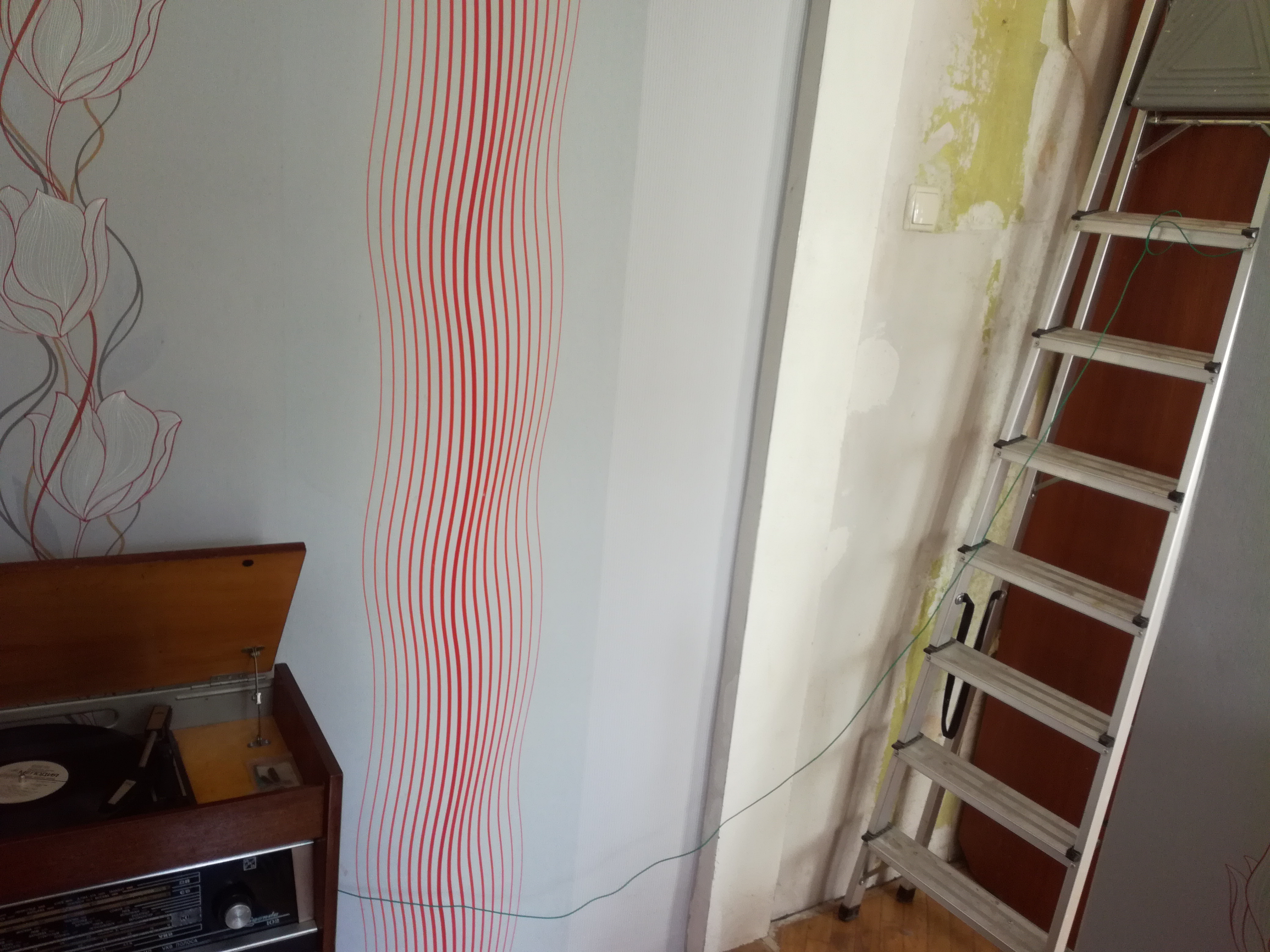 Радиола ригонда 102 с подсоединенной внешней антенной в виде металлической лестницы.